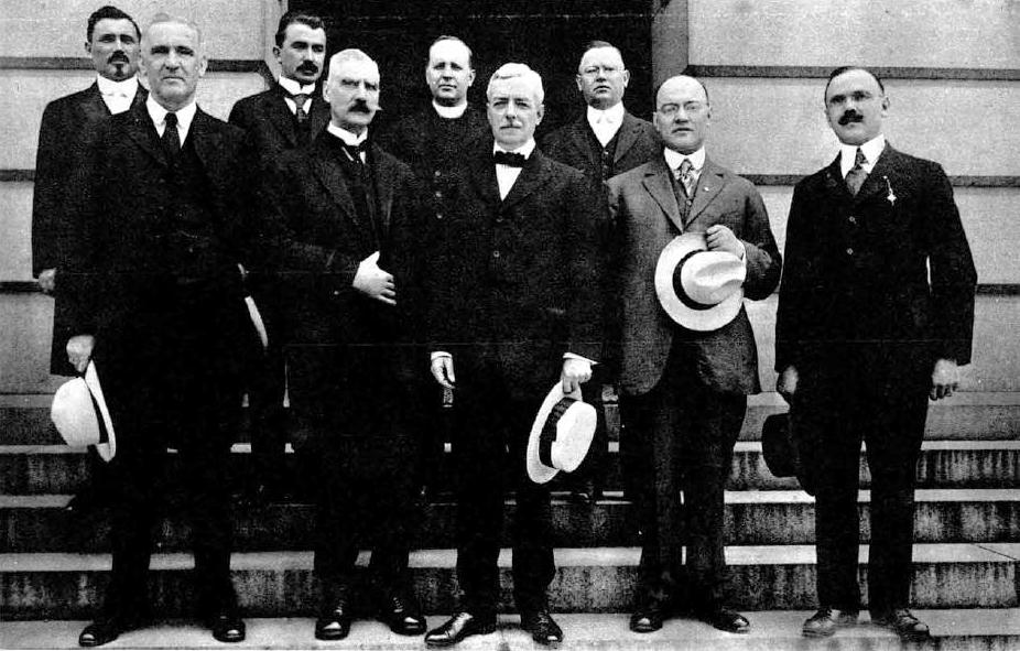 Jugoslovanski odbor v Washingtonu